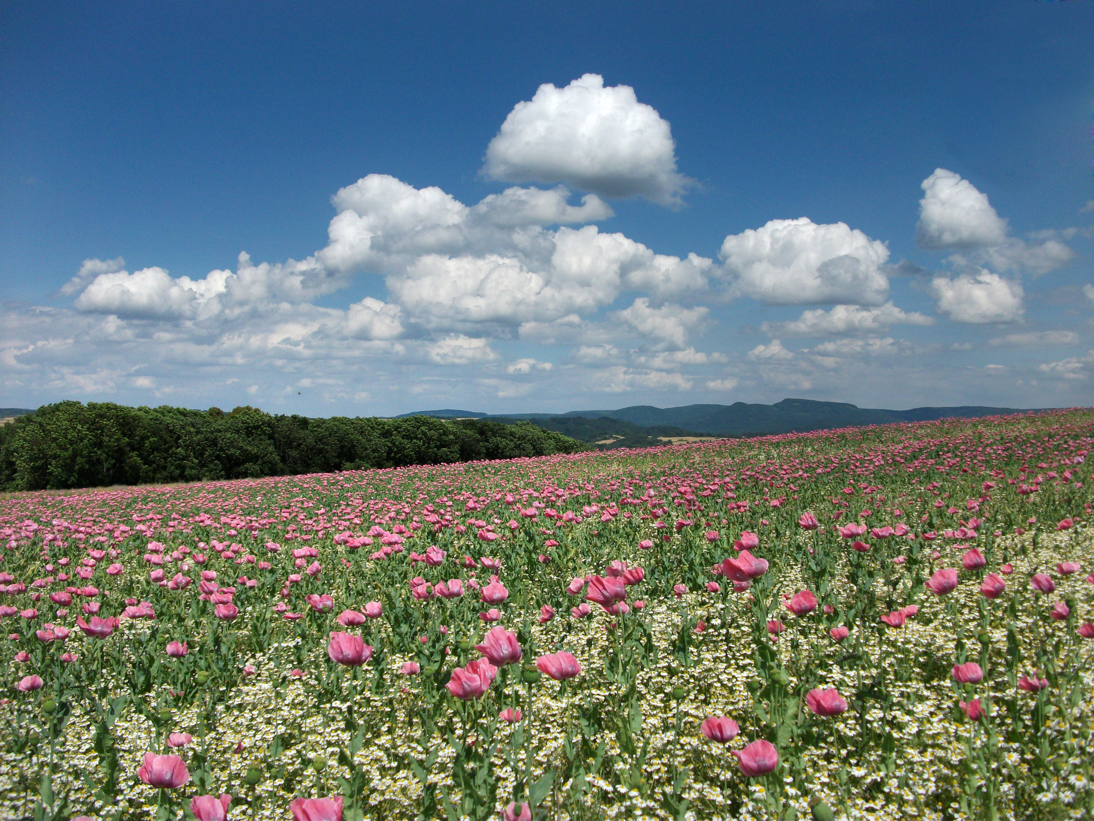 Der Mohnanbau in Germerode am Hohen Meißner begann in 2010 und in jedem folgenden Jahr vergrößerte sich die Anbaufläche. Anfangs blühte der Mohn auf 1,5 Hektar, in 2018 wurden schon rund 20 Hektar bestellt. Mit der Zahl der Felder wuchs auch die Zahl der Besucher. In 2017 sollen es 25.000 gewesen sein, schätzten die Verantwortlichen. Die Felder sind nicht umzäunt und frei zugänglich. Rund um die Blüte, die meist nicht vor Ende Juni beginnt, gibt ein umfangreiches Veranstaltungsprogramm.